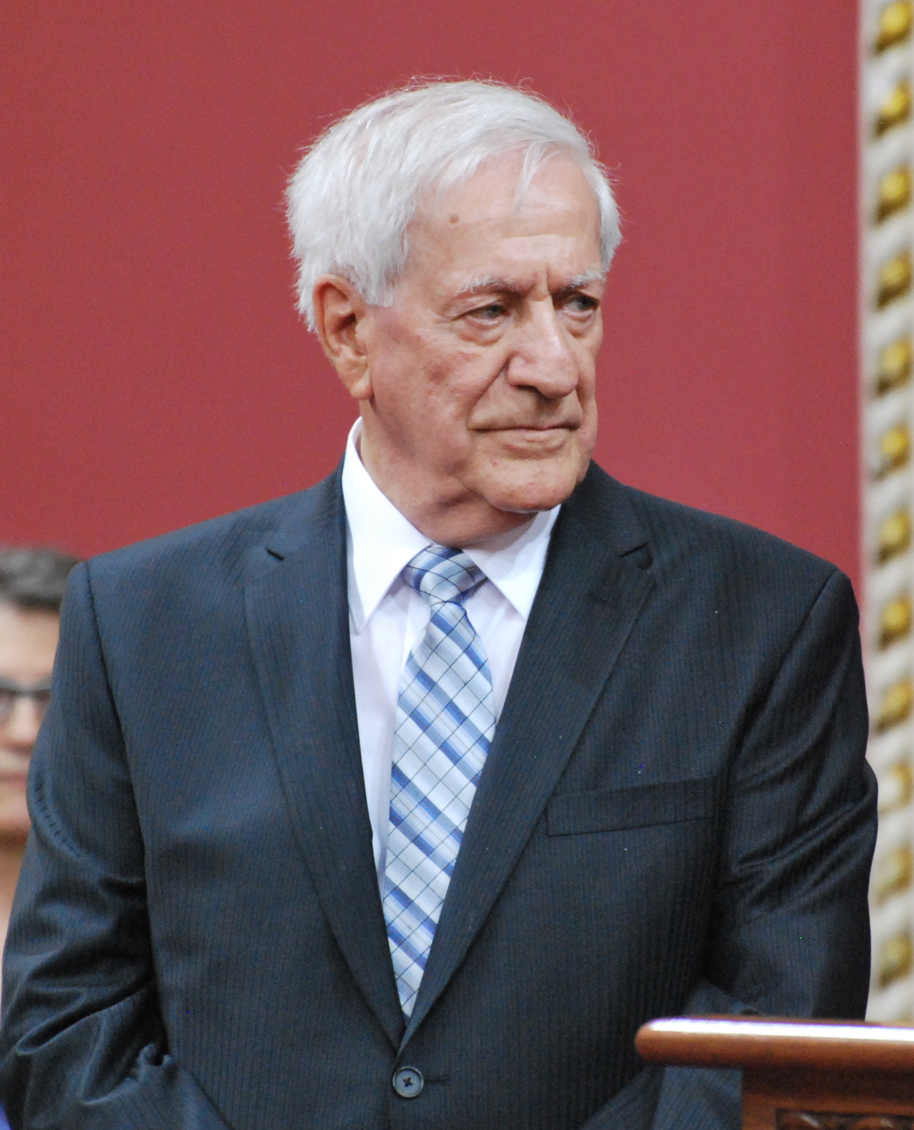 Cérémonie de remise de l'ordre national du Québec 2013. Marc-André Bédard